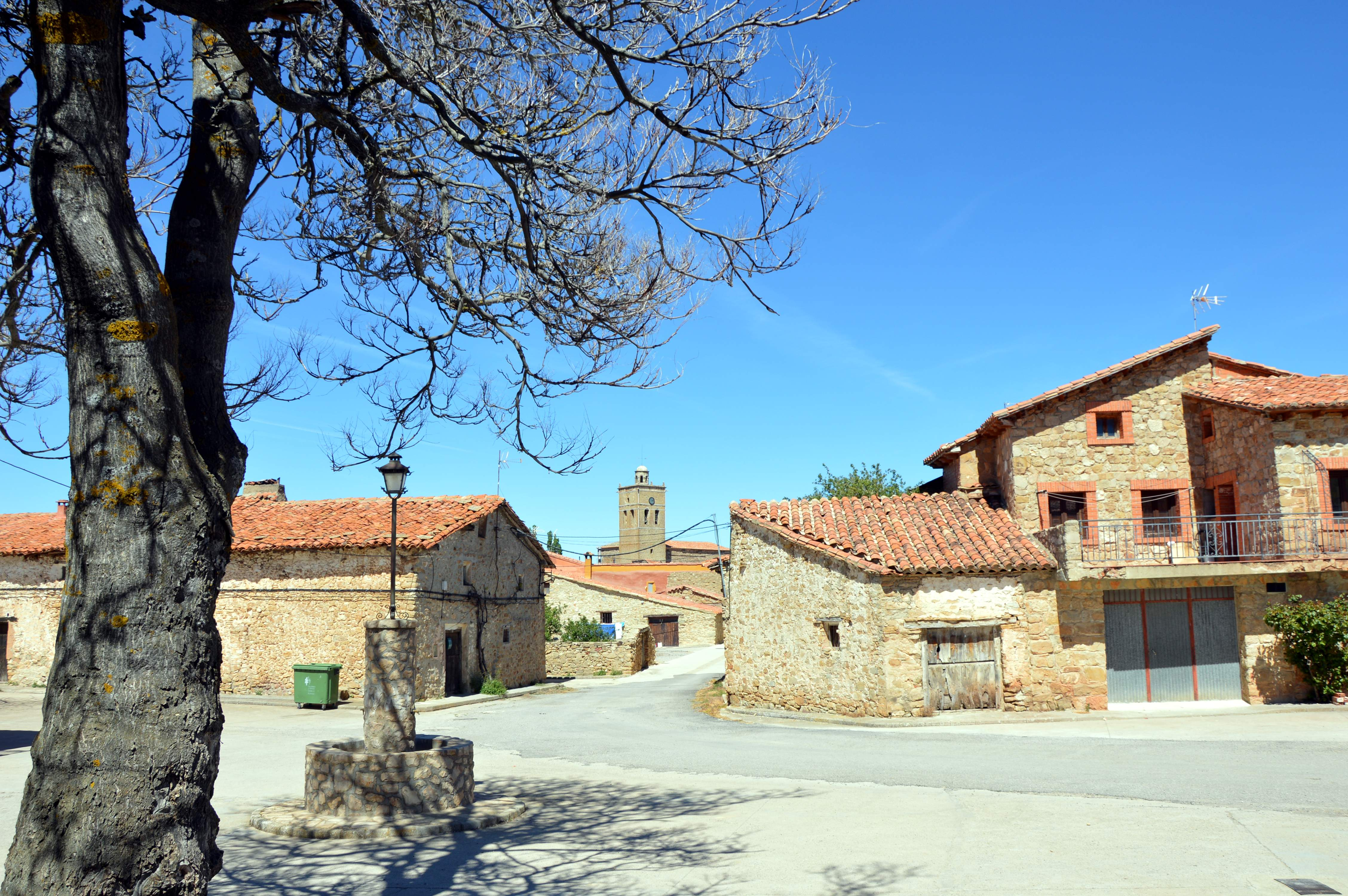 Vista parcial del caserío de Jabaloyas (Teruel), desde la Casa de la Sirena (siglo XV), con la parroquial al fondo (2017).